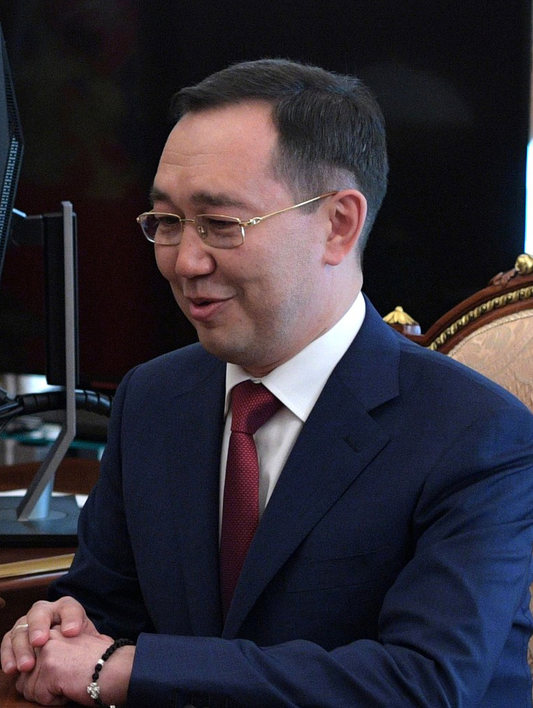 Рабочая встреча с Айсеном Николаевым. Президент подписал Указ о назначении А. Николаева временно исполняющим обязанности Главы Республики Саха (Якутия).